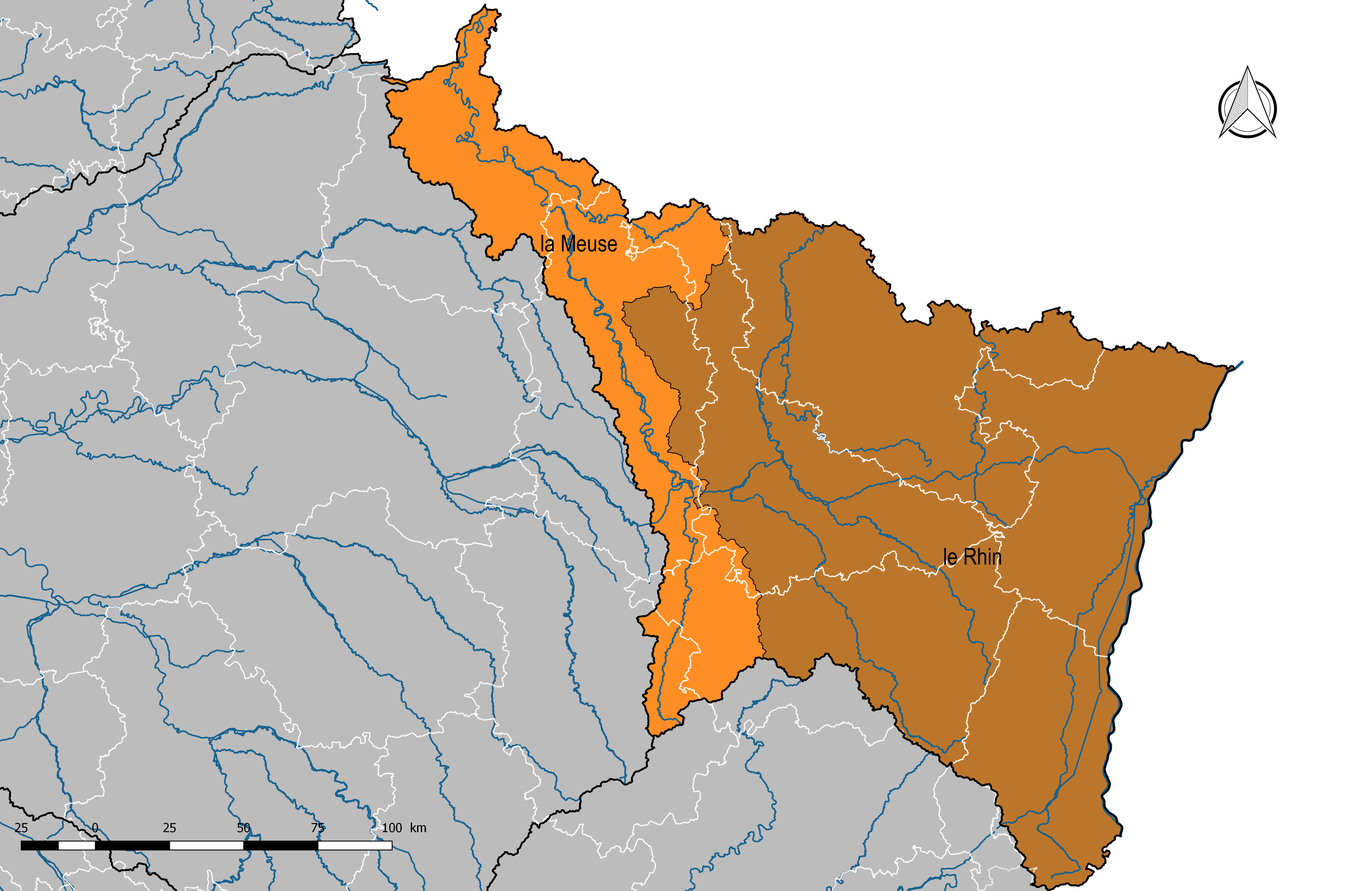 Carte du bassin hydrographique Rhin-Meuse (France) et de son découpage en régions hydrographiques.